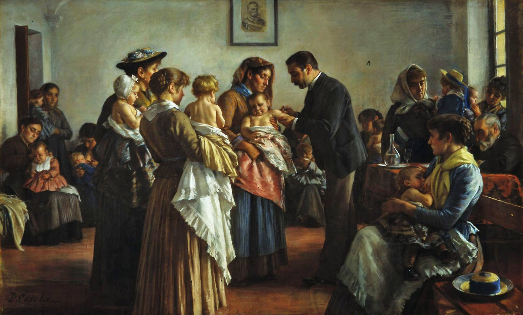 Demetrio Cosola (San Sebastiano Po, Torino, 1851- Chivasso,1895) La vaccinazione nelle campagne, 1894 pastello su carta telata, cm 240 x 145 Chivasso, Palazzo Santa Chiara